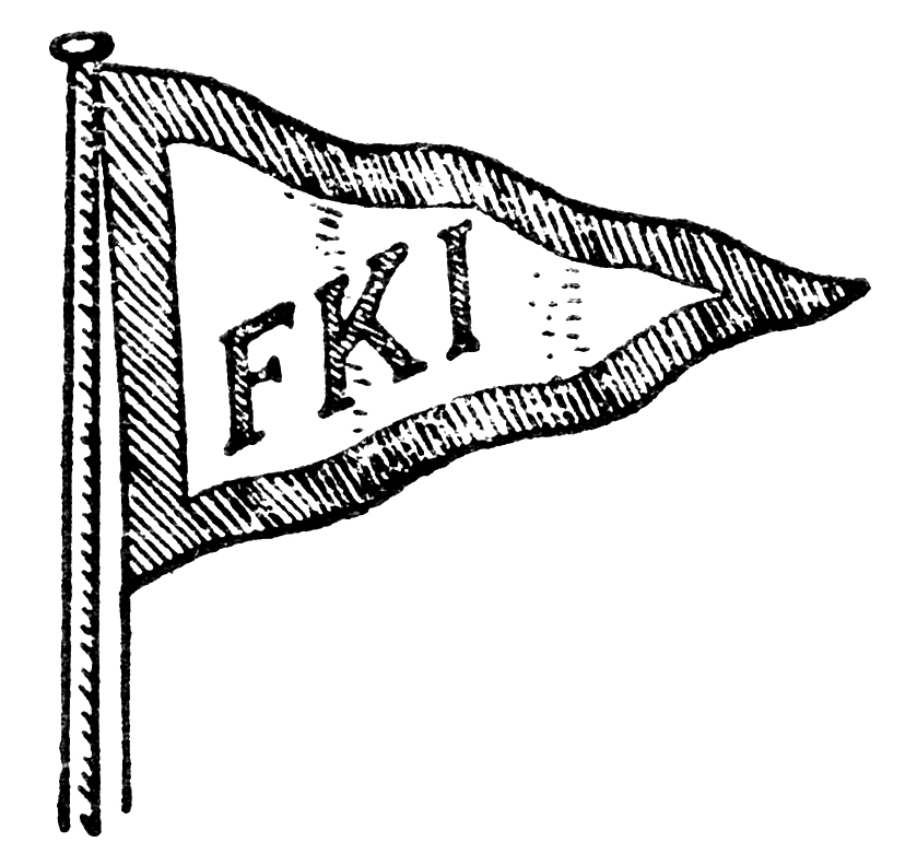 Standert för Föreningen för Kanot-Idrott (FKI)